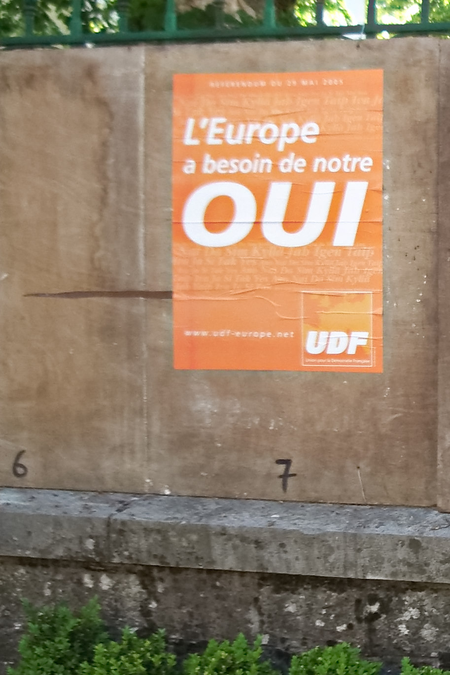 Werbeplakat für das Votum "Ja" beim Referendum für eine Verfassung Europas in Frankreich 2005 (angezeigtes Aufnahmedatum in den EXIF-Daten des Bildes höchstwahrscheinlich falsch)